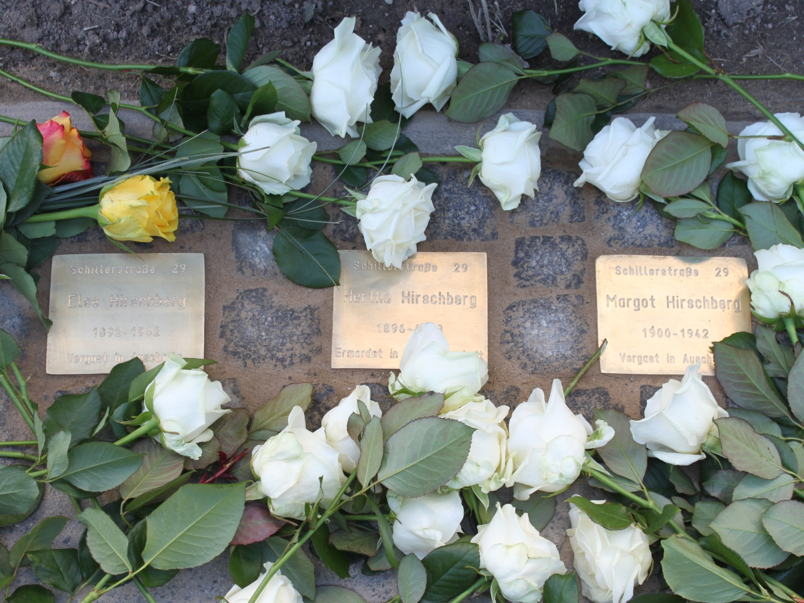 Denksteine für Dr. Else Hirschberg (1892 - 1942), Hertha Hirschberg (1896 - 1943) und Margot Hirschberg (1900 - 1942). Else Hirschberg war die erste Chemieabsolventin der Universität Rostock. Familie Hirschberg wohnte während ihrer Zeit in Rostock in der Schillerstraße 29. Nachdem sie 1936 nach Hamburg zogen, wurden Else und Margot Hirschberg 1942 nach Auschwitz deportiert. Die Schwester Hertha wurde am 1942 aus Berlin nach Theresienstadt deportiert und starb dort am 23. Juni 1943.